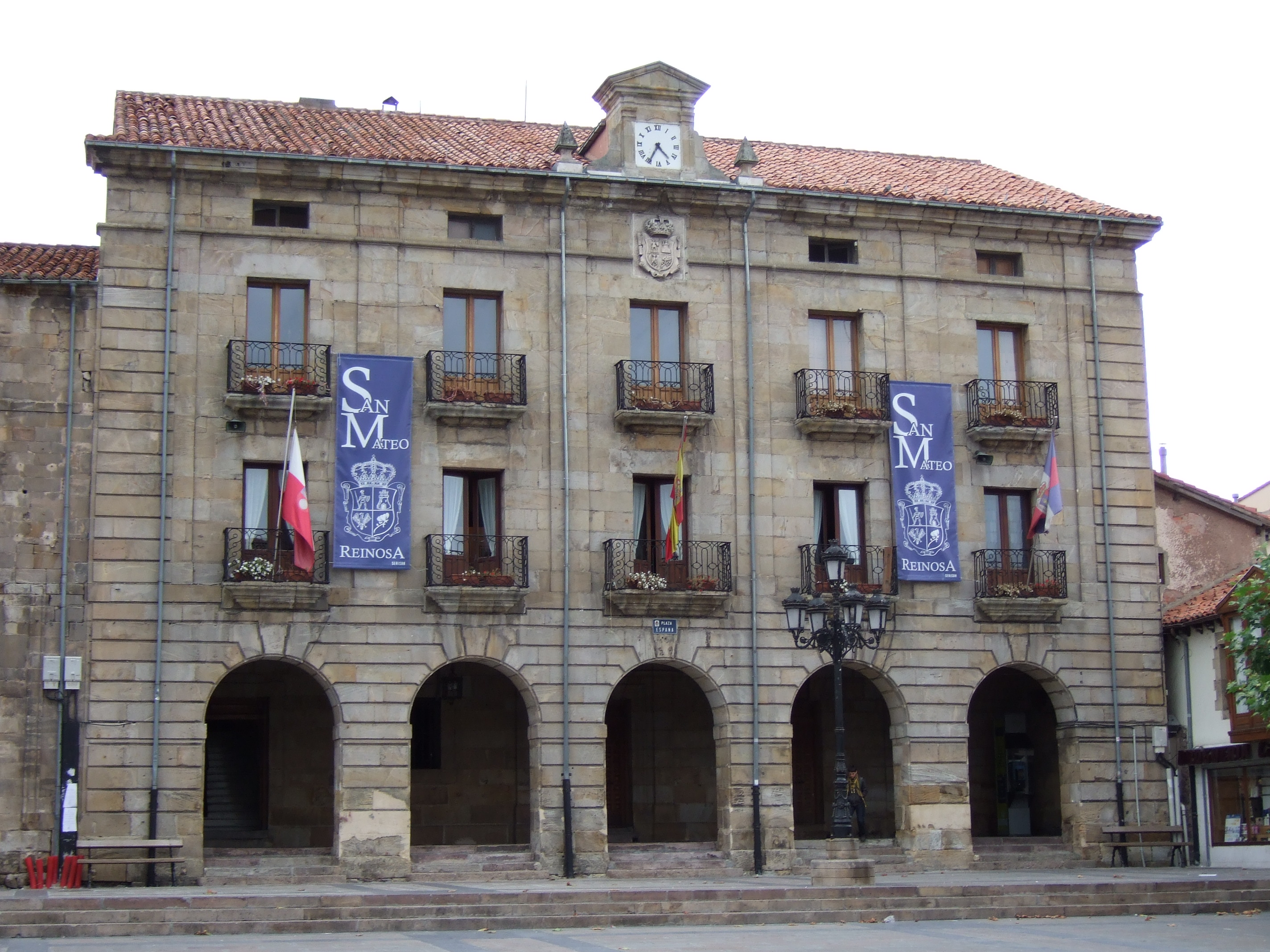 Fachada del Ayuntamiento de Reinosa en Santander (España).